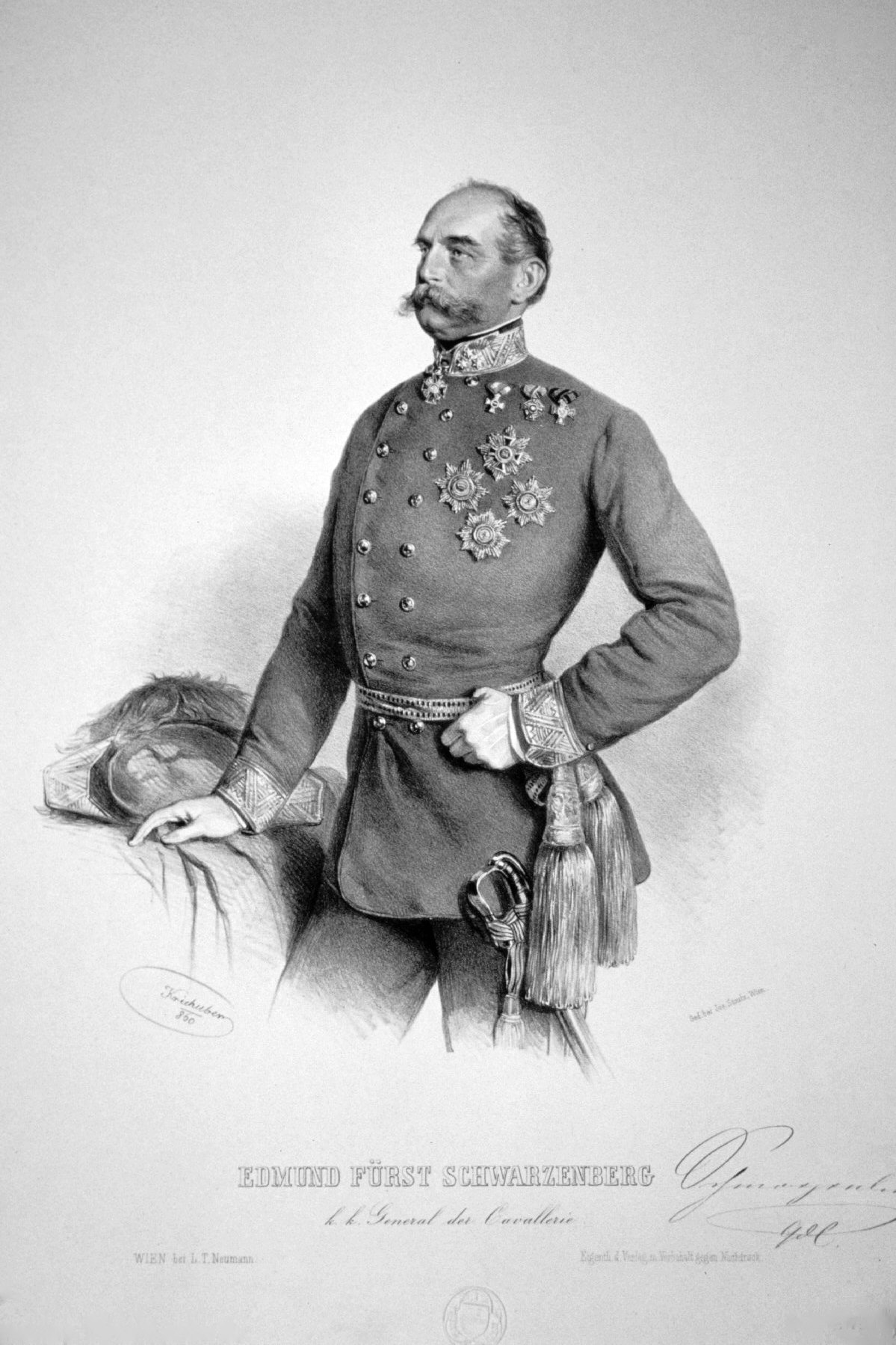 Edmund zu Schwarzenberg (1803-1873), österreichischer General